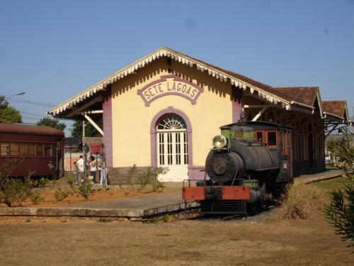 Museu do Ferroviário da cidade de Sete Lagoas, Minas Gerais, Brasil